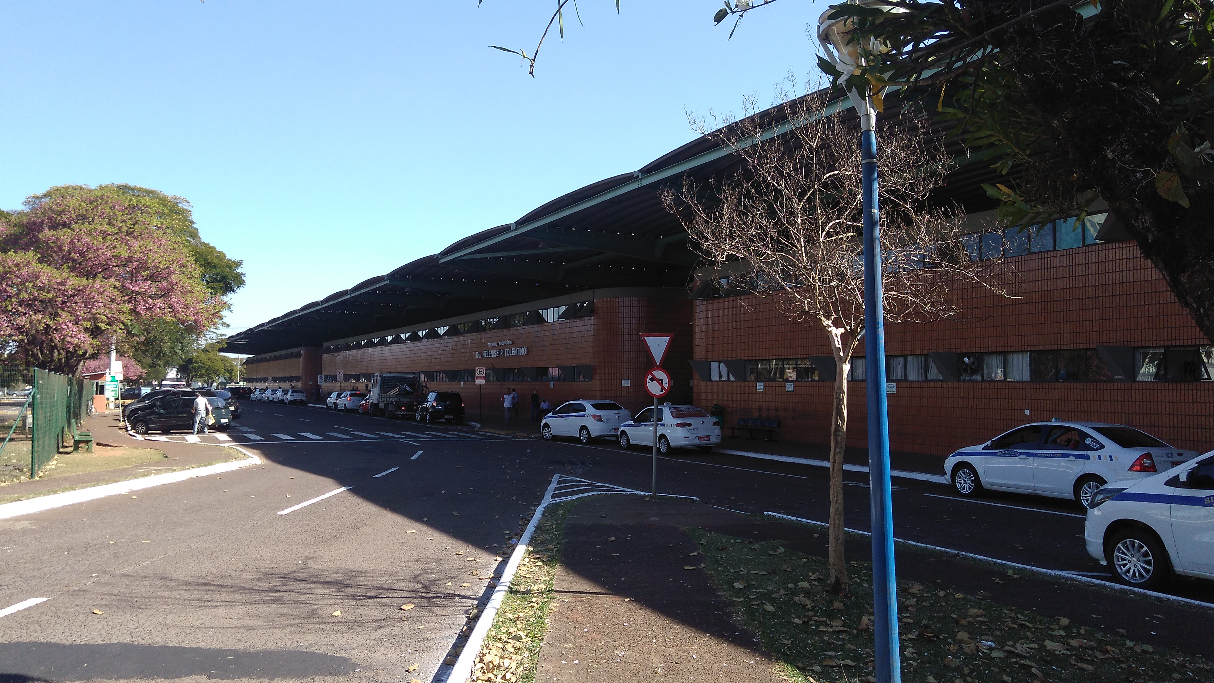 Rodoviária de Cascavel (Paraná).